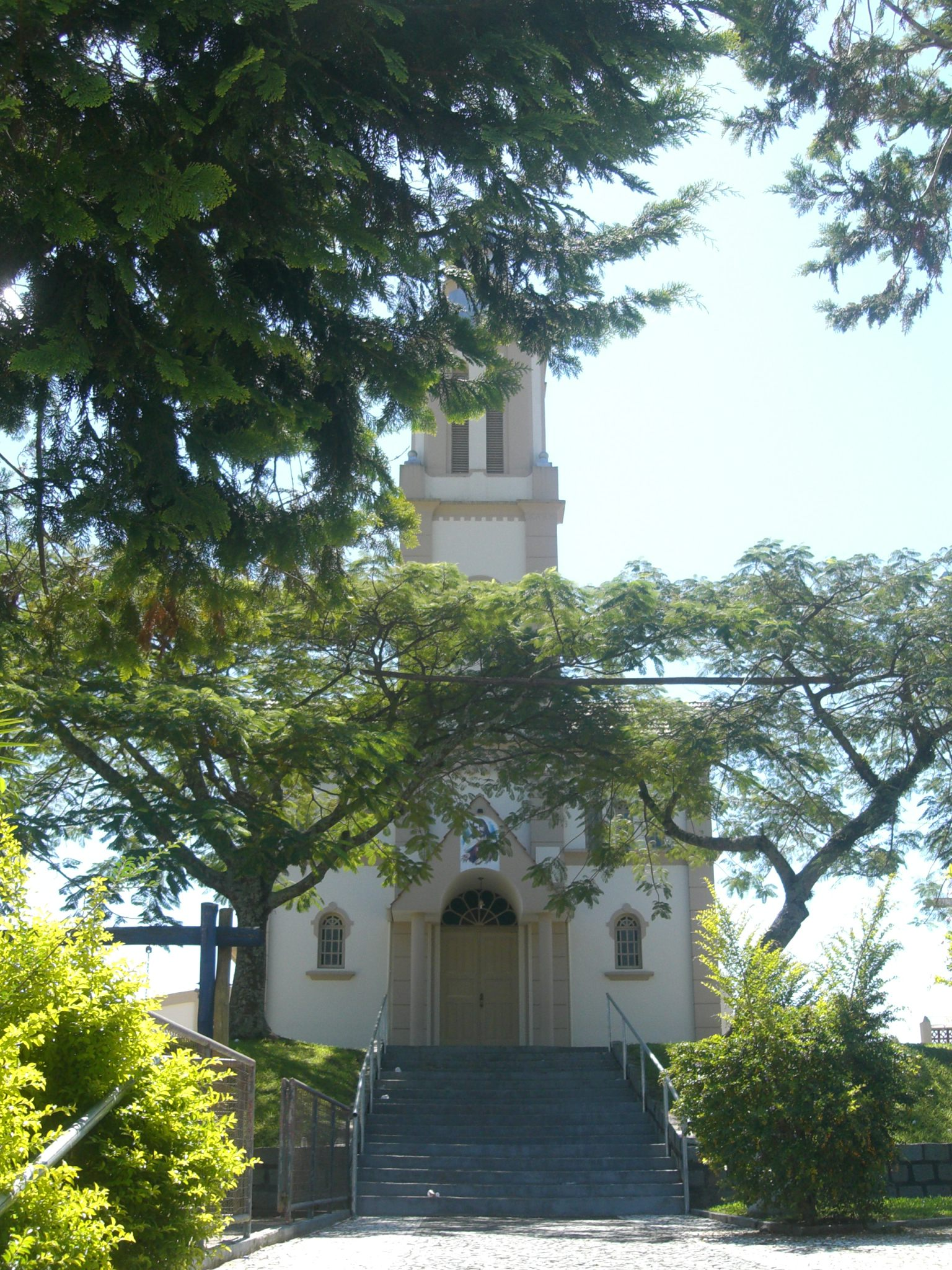 Igreja (church/Kirche/église/chiesa) de Águas Mornas